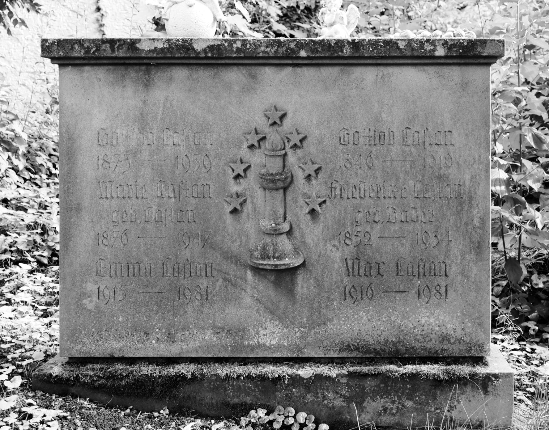 Waldenserwappen auf einem Grabstein auf dem Friedhof St.Peter in Mühlacker Gottlob Castan 1846—1910 Friedericke Castan geb. Bader 1852—1934 Gottlob Castan 1873—1939 Marie Castan geb. Castan 1876—1947 Emma Castan 1915—1981 Max Castan 1916—1981